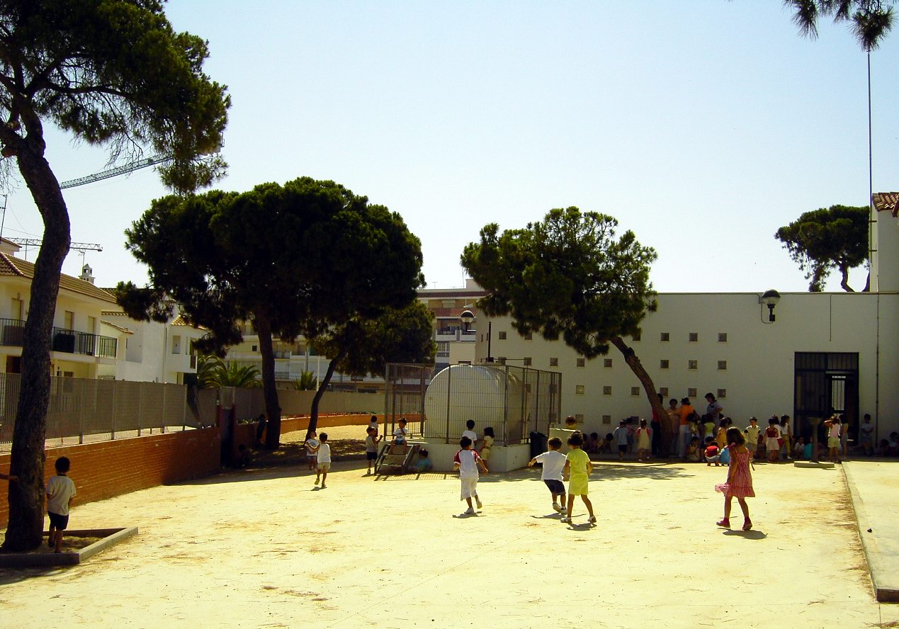 Patio del Centro de Educación Infantil Virgen del Carmen de Punta Umbría (Provincia de Huelva).